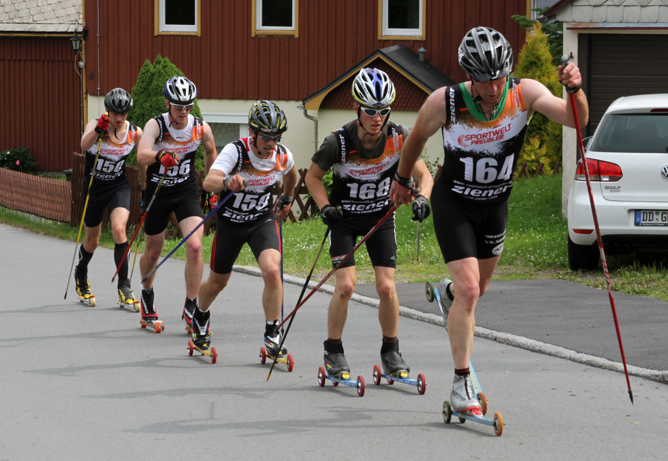 Rollskiläufer im klassischen Stil